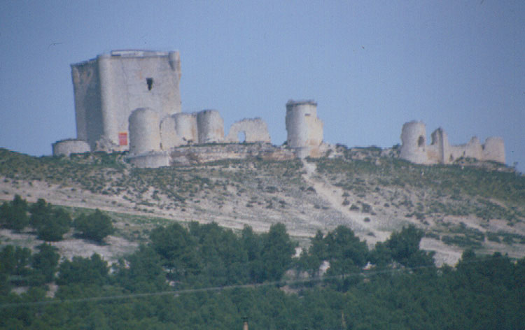 Castillo - Íscar (Valladolid) - Diapositiva 48 x 48 Color